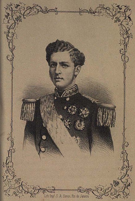 S. A. o Sr. Duque de Saxe.